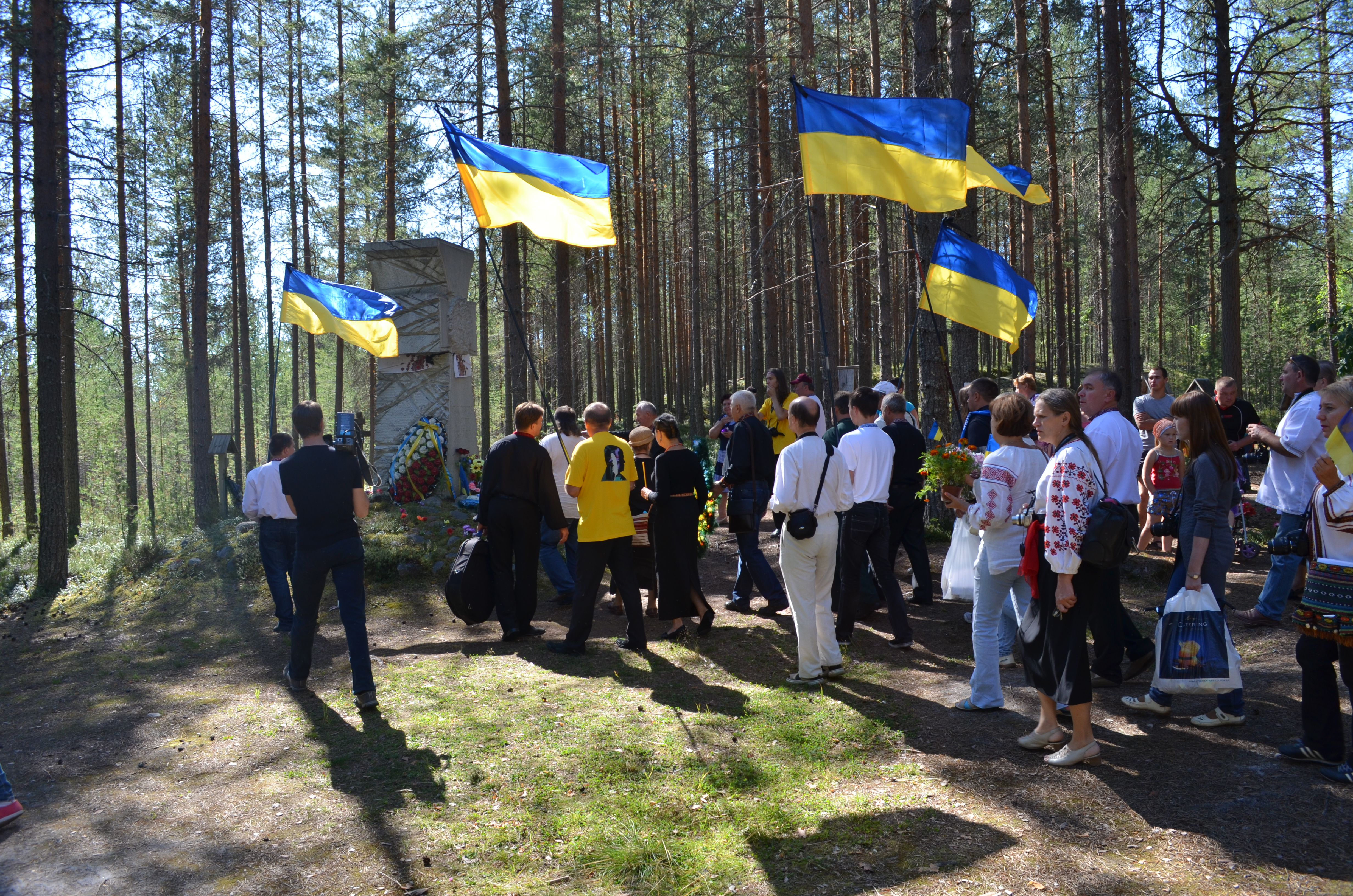 Урочище Сандармох. Дні пам’яті. Українська делегація